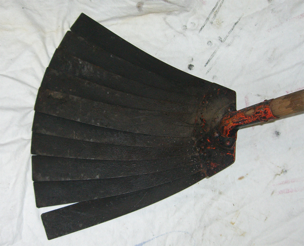 Foto einer Feuerpatsche